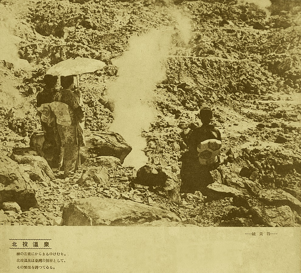 1930年代北投溫泉硫磺谷老照片(出自風光台灣，1939年出版)。 延伸閱讀：北投公共浴場( 1920左右 )